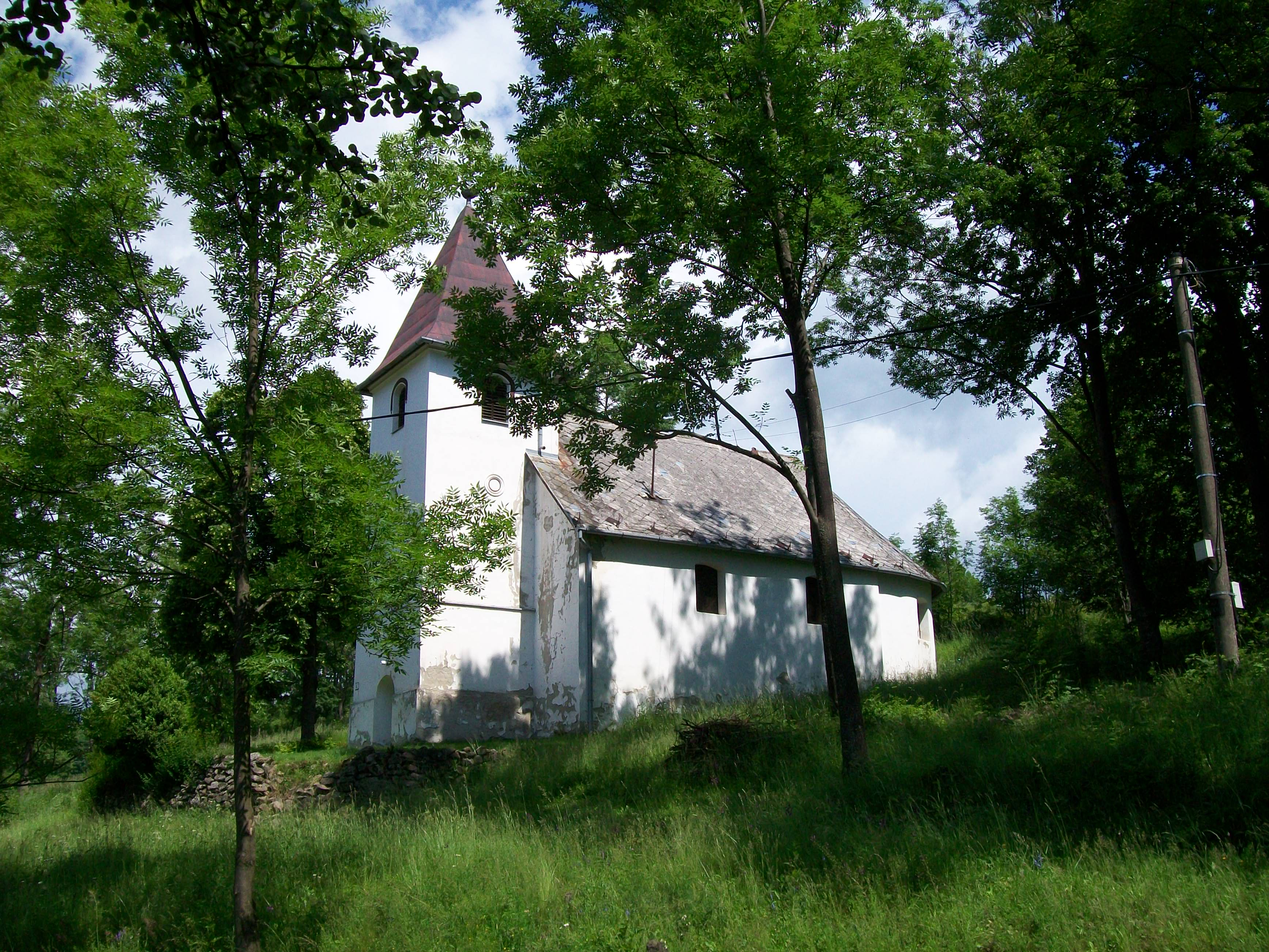 Evanjelický kostol z roku 1811 v obci Lentvora, je kultúrnou pamiatkou